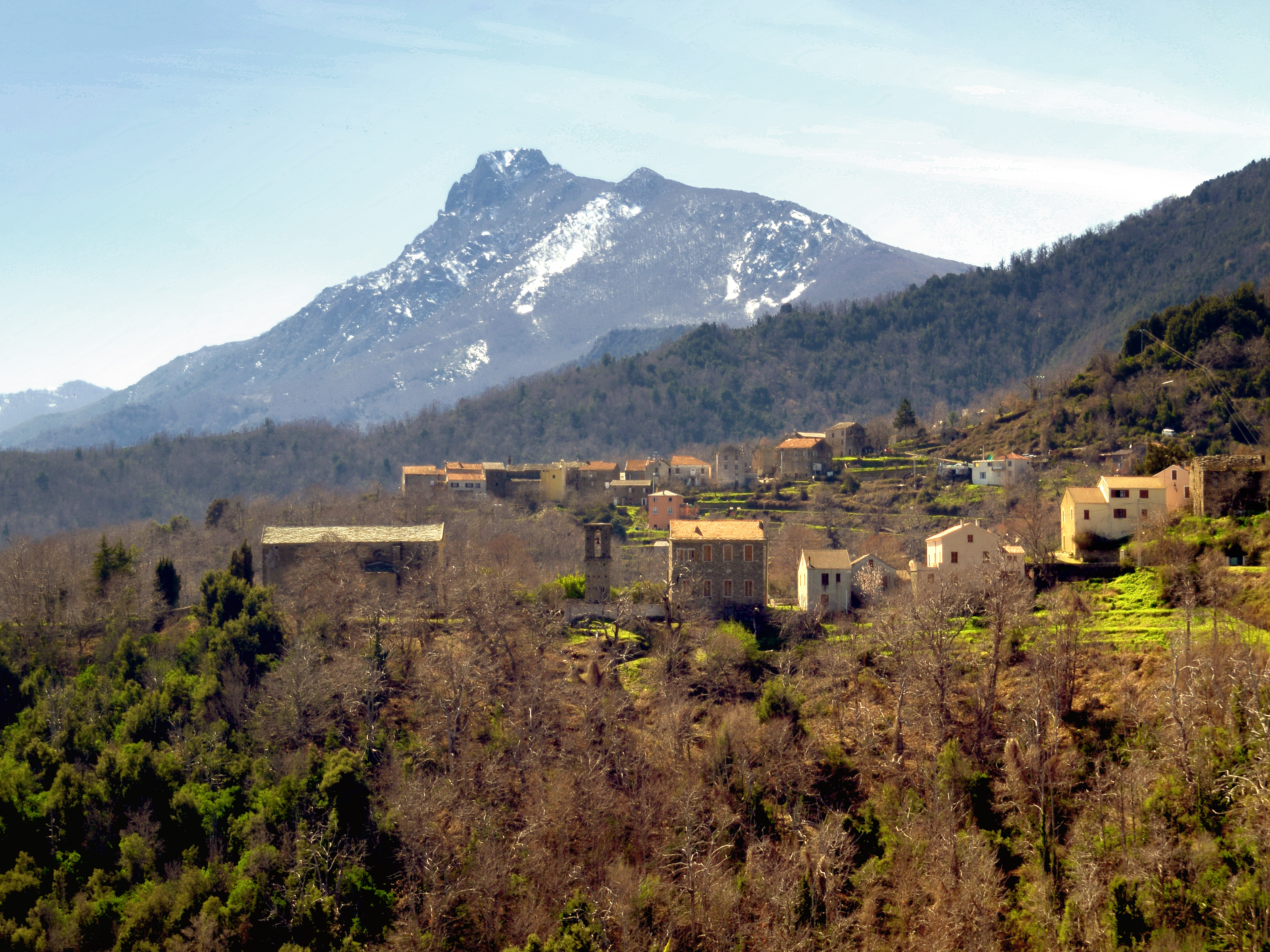 Crocicchia - Hameau de Sant'Andrea et son église. A l'arrière, le village et le Monte San Petrone